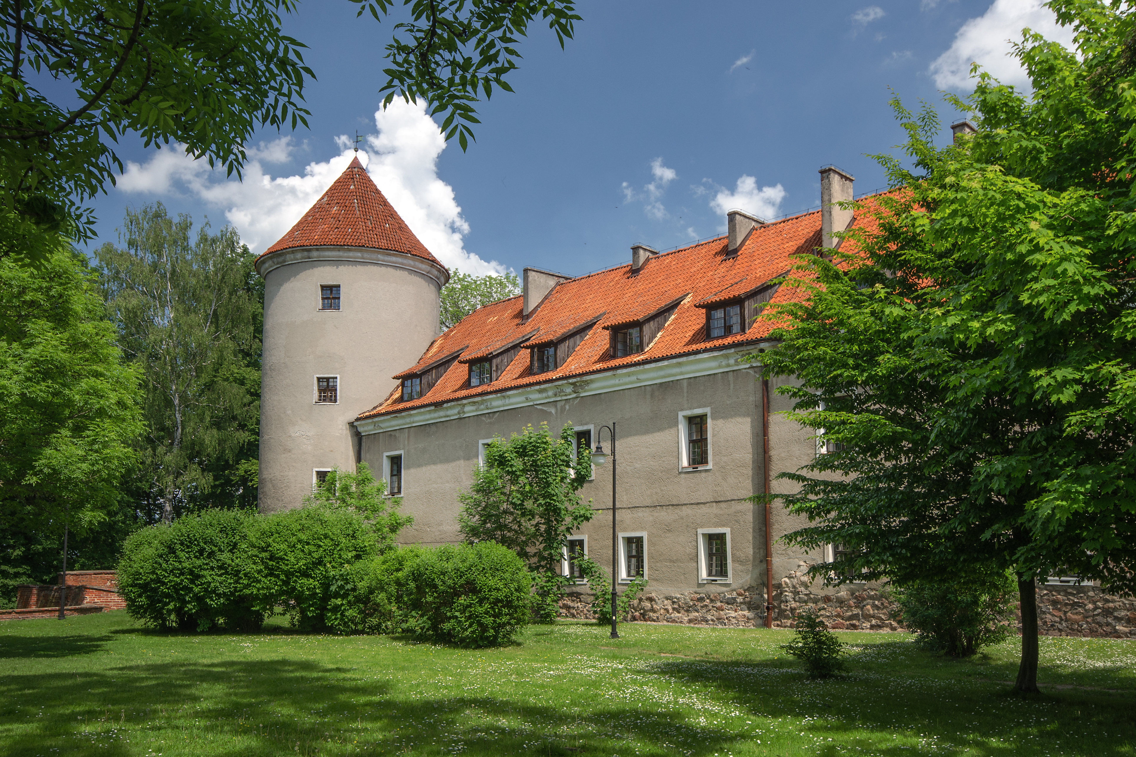 Pasłęk, zamek, 1320-1339, kon. XIV, XVI, 1967-1976